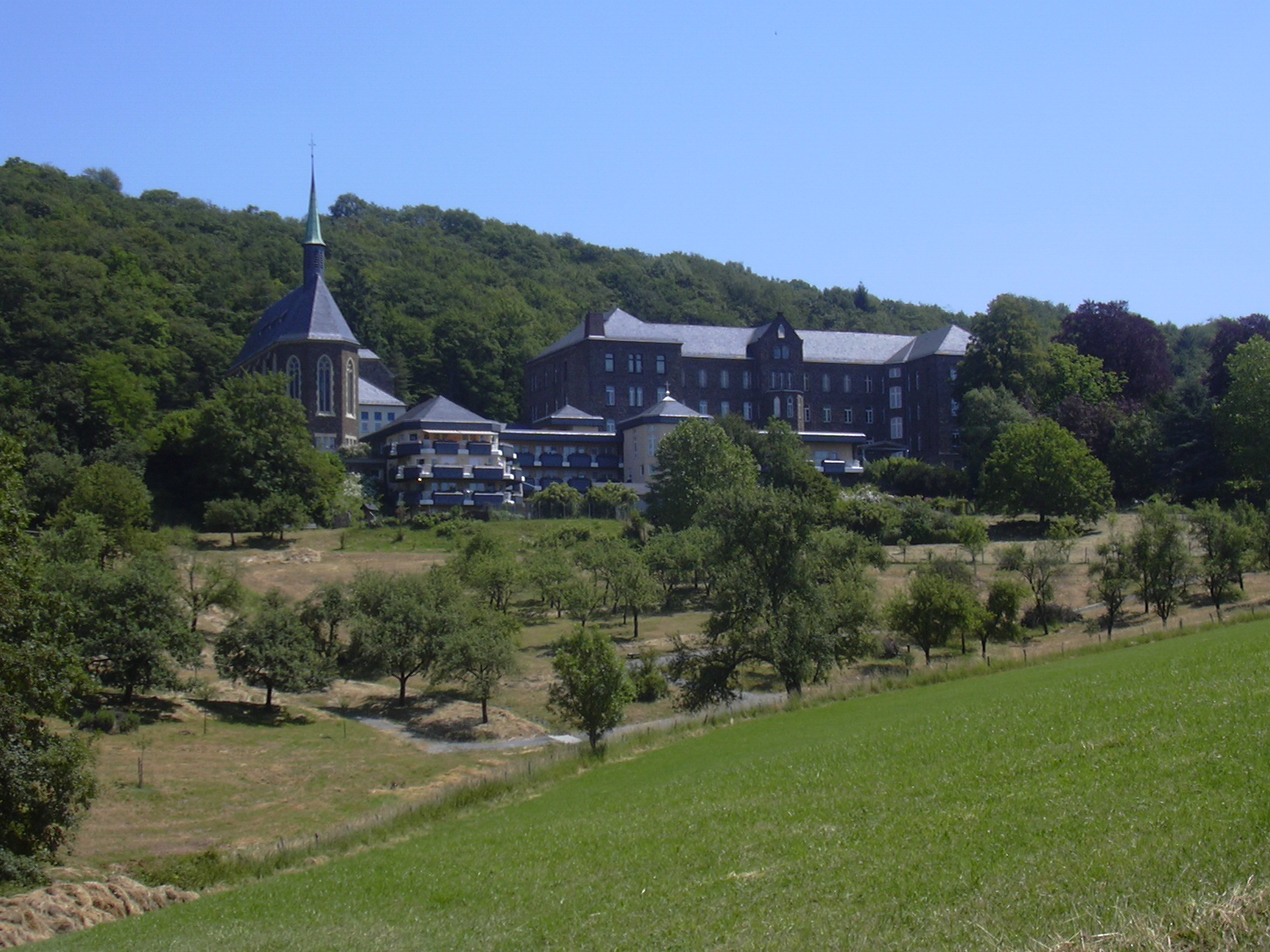 Monastery "Marienhaus", Waldbreitbach, Westerwald/Germany